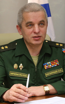 Начальник Национального центра управления обороной Российской Федерации генерал-лейтенант Михаил Мизинцев